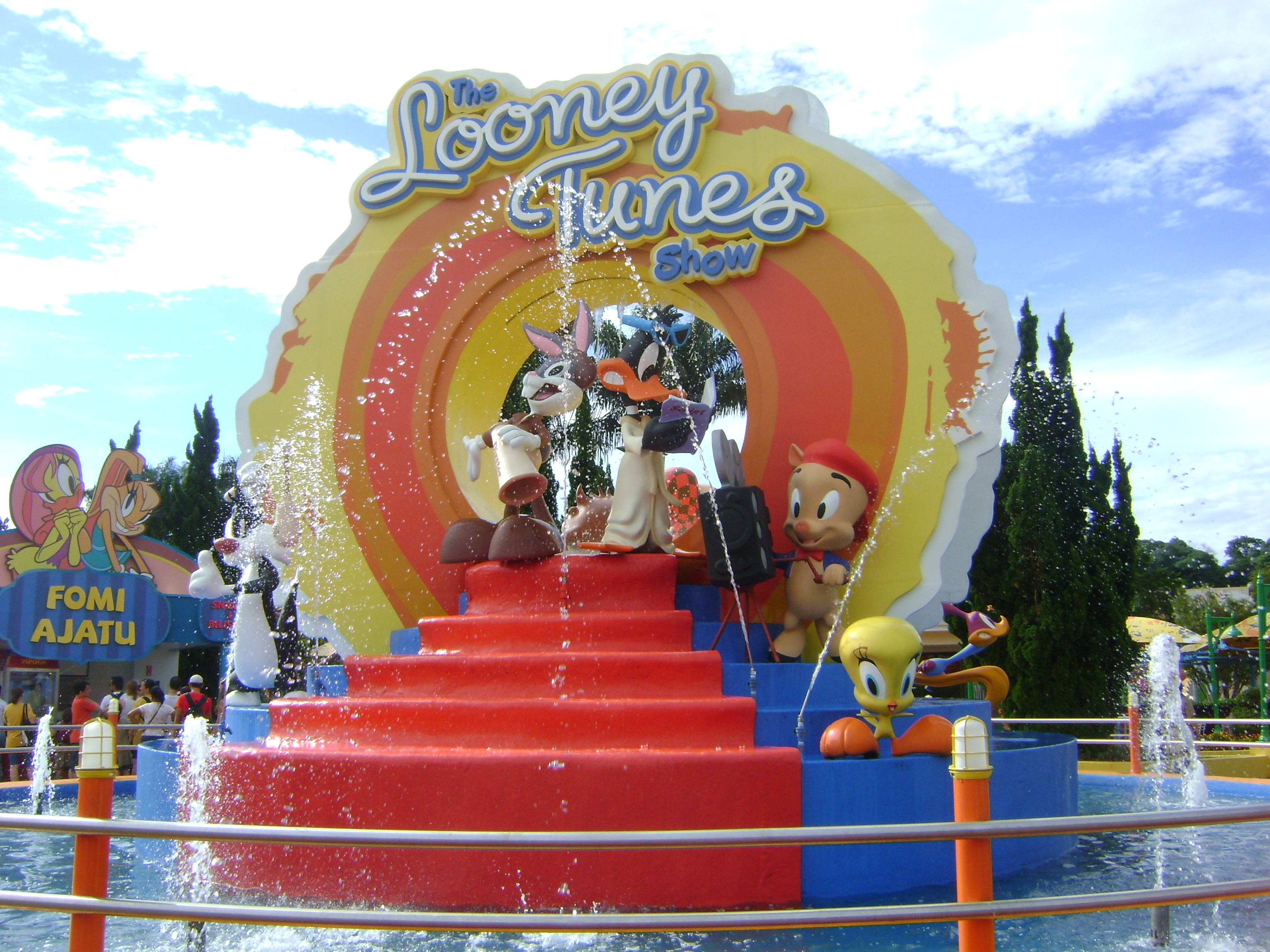 Fonte Hopi Hari